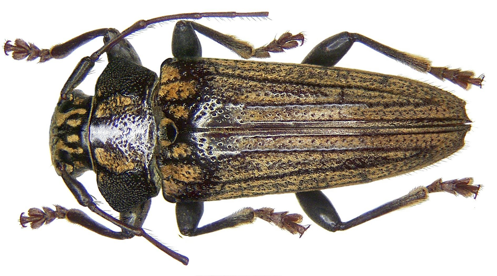 Familie: Cerambycidae Groesse: 16 mm Fundort: Indonesien, Djampea leg. A.Everett, 1895; det. Breuning, 1950 Paratype, Coll. Museum Basel Photo: U.Schmidt, 2008